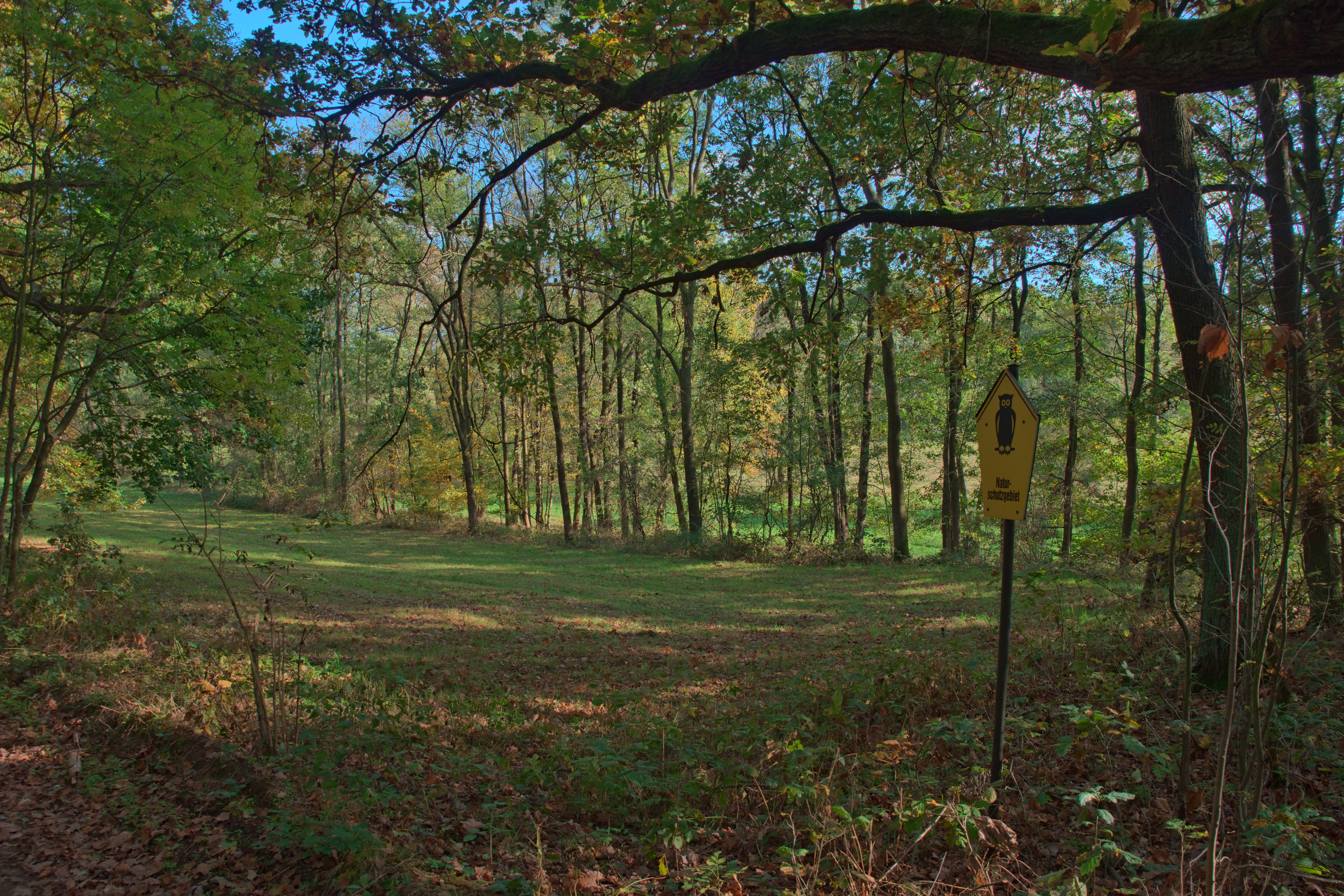 Naturschutzgebiet Winzerwiese und Gosebruch bei Naundörfel